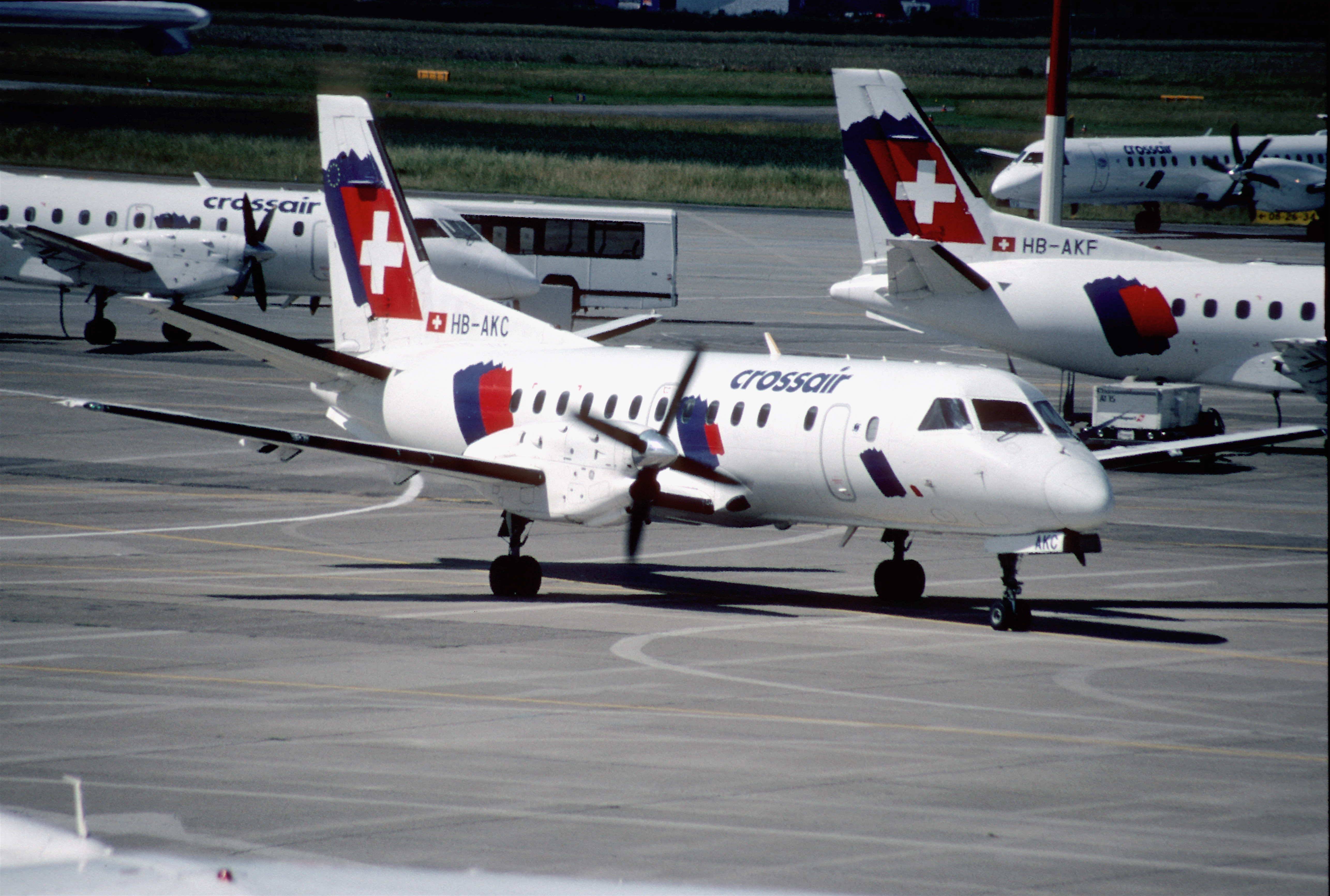 95ah - Crossair Saab 340B; HB-AKC@BSL;01.06.2000